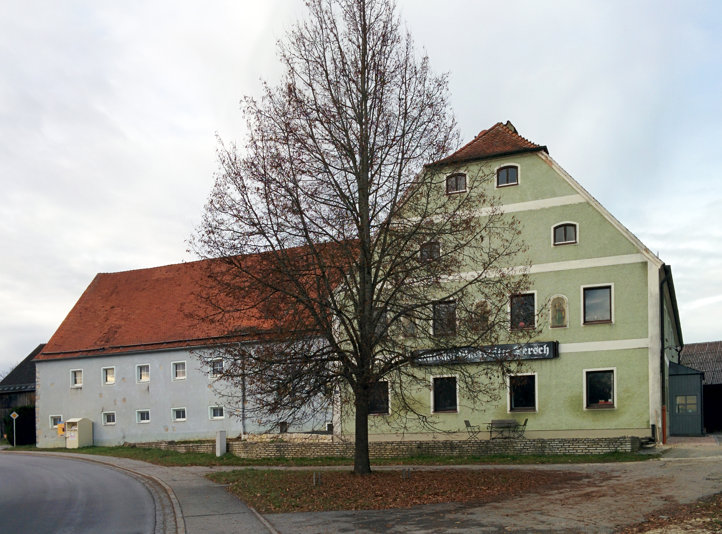 Ehemalige Brauerei und Wirtshaus in Willenhofen (Parsberg)